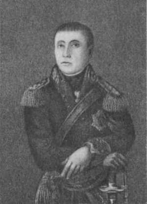 Беларуская (тарашкевіца): Караль Прозар